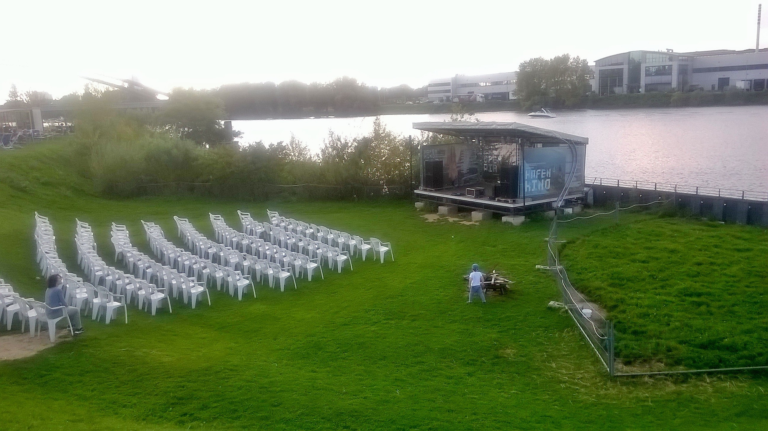 Freiluftkino der Kulturinitiative Hafen 2